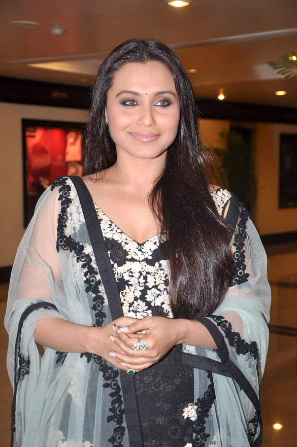 Rani Mukerji at Lonely Planet Magazine India Awards 2012